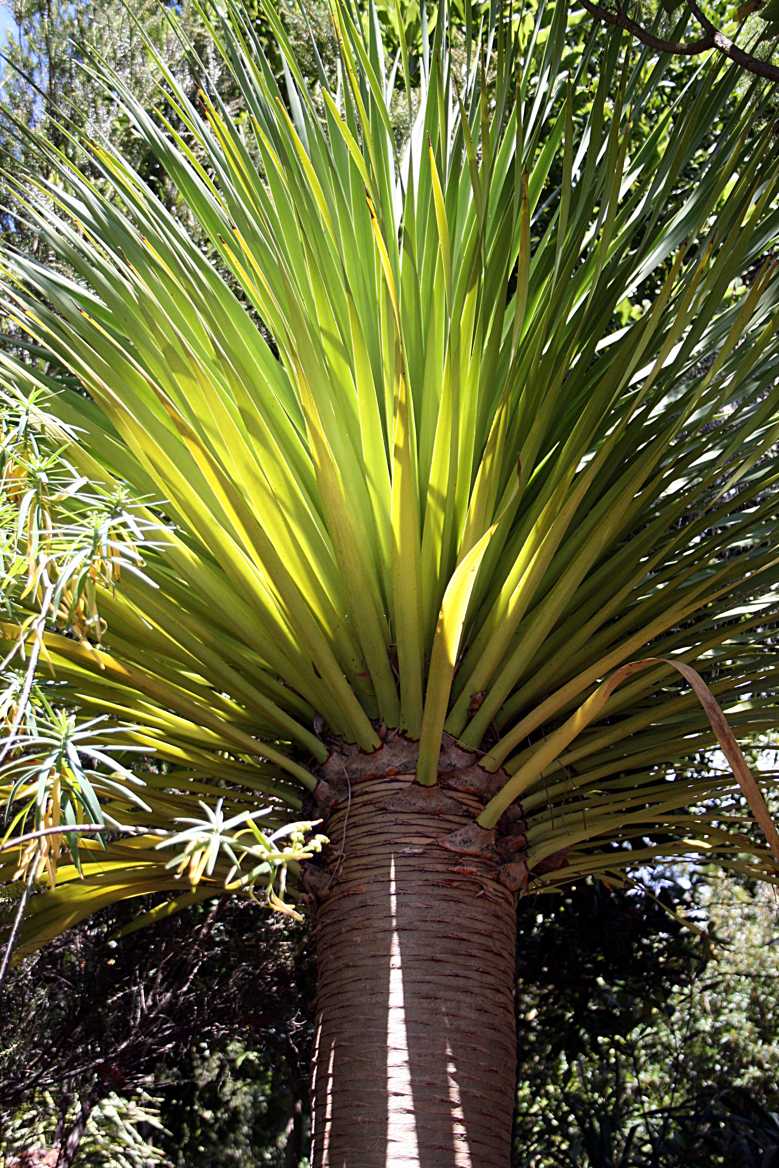 Monte_(Funchal)_-_Dracaena_draco_(Kanarischer_Drachenbaum)